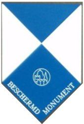 Monumentenschildje of herkenningsteken voor Vlaams Beschermd erfgoed. Met tekst "Beschermd Monument" en logo Onroerend Erfgoed Vlaanderen.